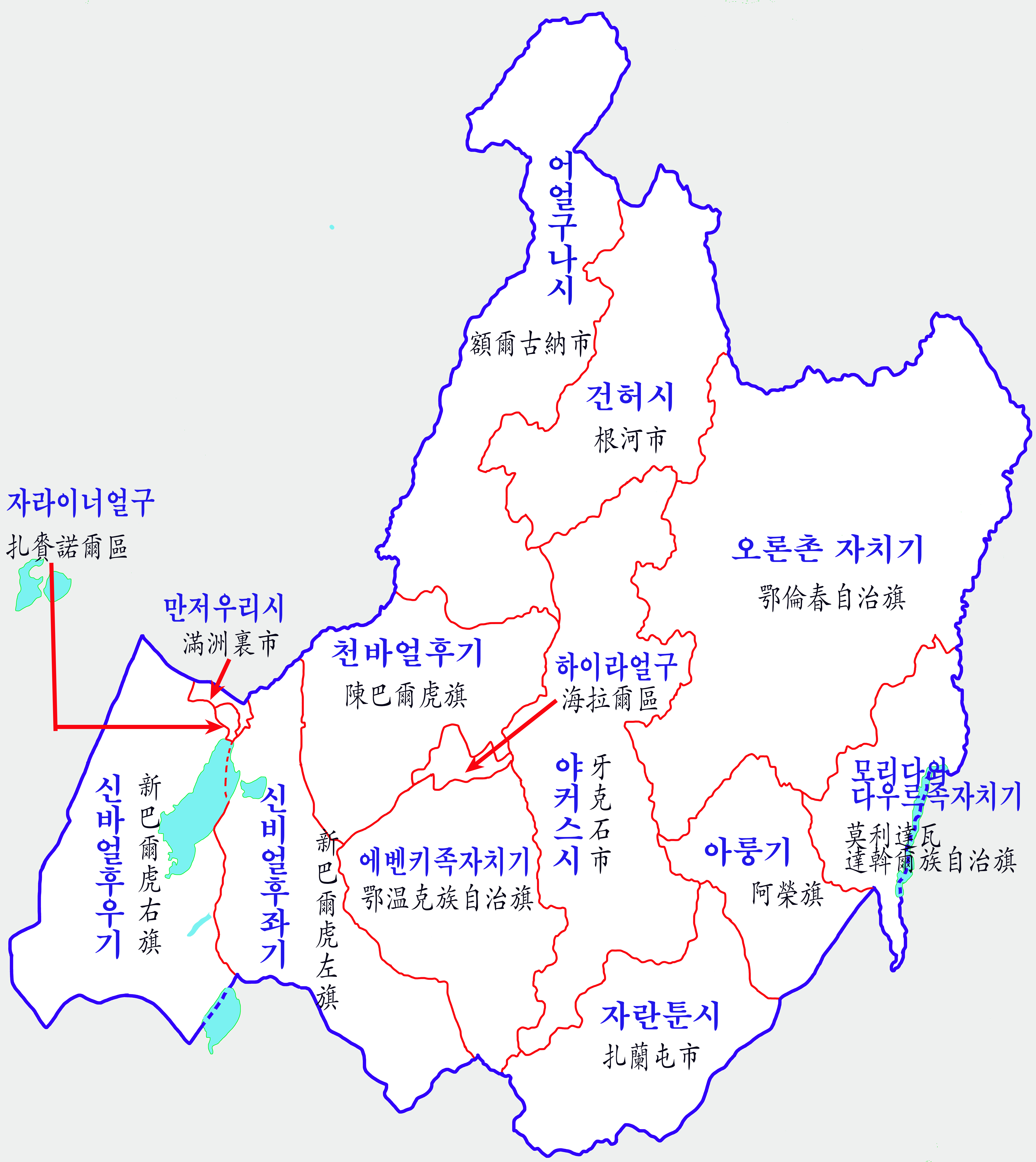 후룬베이얼시 현급구역도